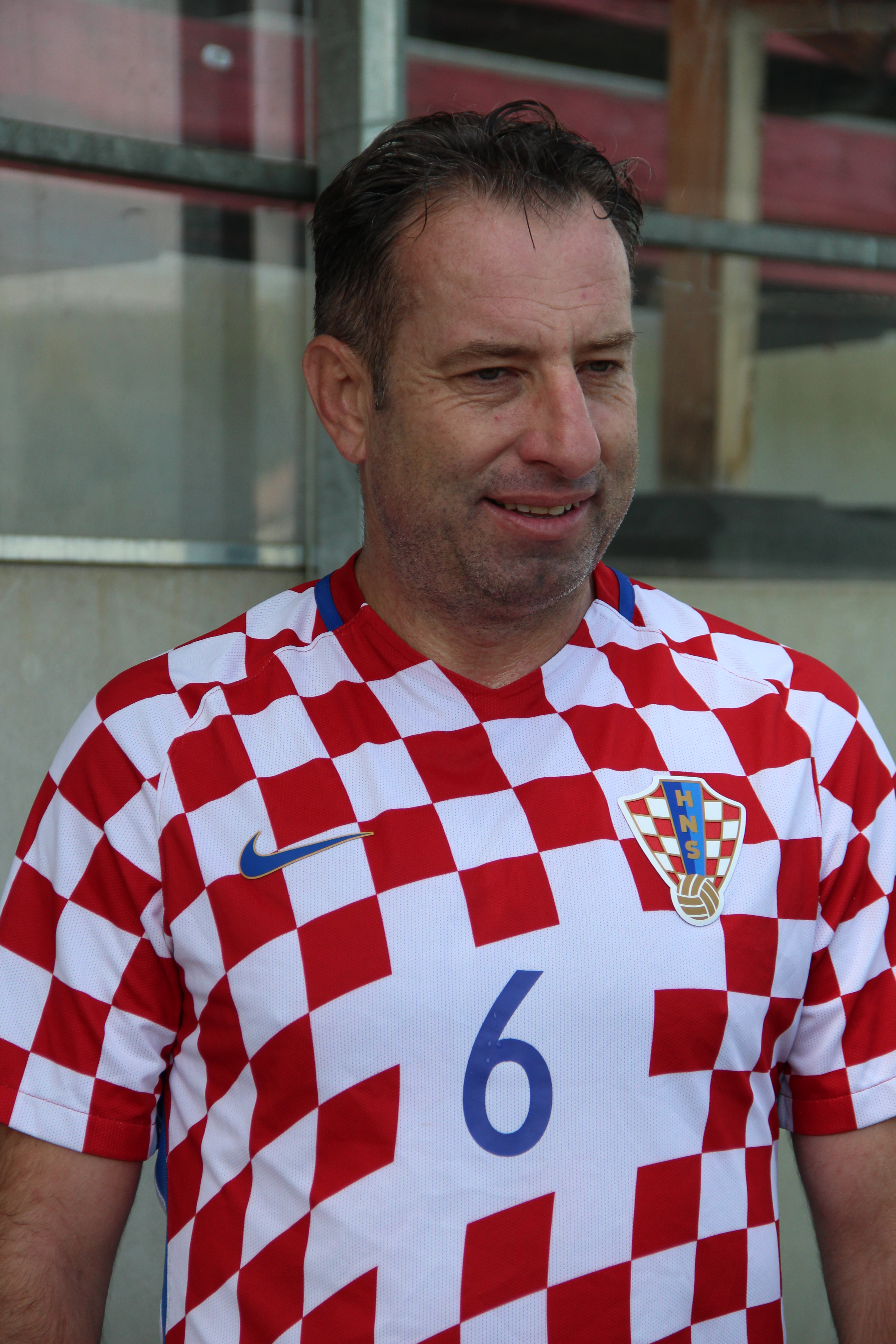 Zeltweger Legendenturnier 2018